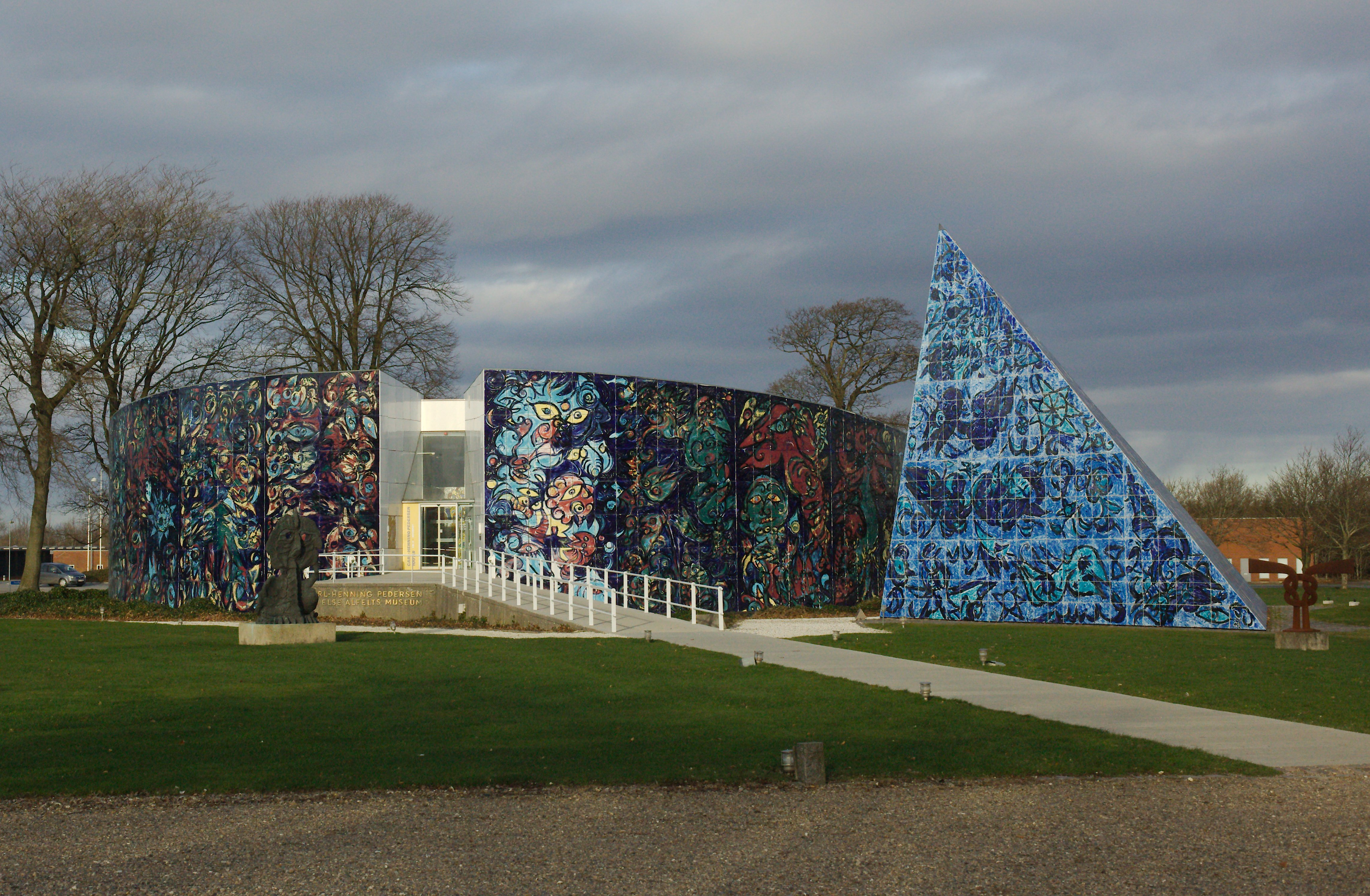 Carl Henning Pedersen og Else Alfelts Museum